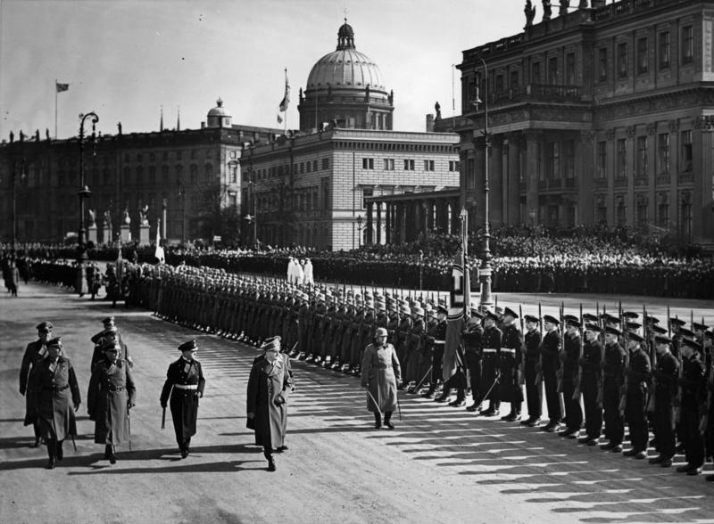 Berlin, Heldengedenktag Heldengedenktag 1940 in Berlin. Hitler schreitet vor der Kranzniederlegung im Ehrenmal das Ehrenbataillon der Wehrmacht ab. Hinter ihm von links: Generaloberst Keitel, Generaloberst von Brauchitsch, Grossadmiral Raeder und Generalfeldmarschall Göring (verdeckt), hinter Generaloberst Keitel General der Infanterie Reinhardt. Fot. Hohw. 10.3.40 [Heldengedenktag] 2097-40 Abgebildete Personen: Hitler, Adolf: Reichskanzler, Deutschland Raeder, Erich: Großadmiral, Oberbefehlshaber der Kriegsmarine, Deutschland (GND 118743511)